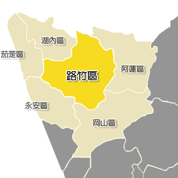 路竹區相對位置